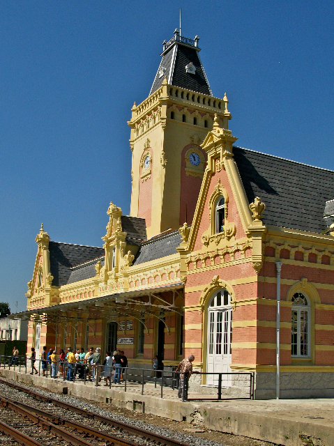 Estação Ferroviária de Guaratinguetá